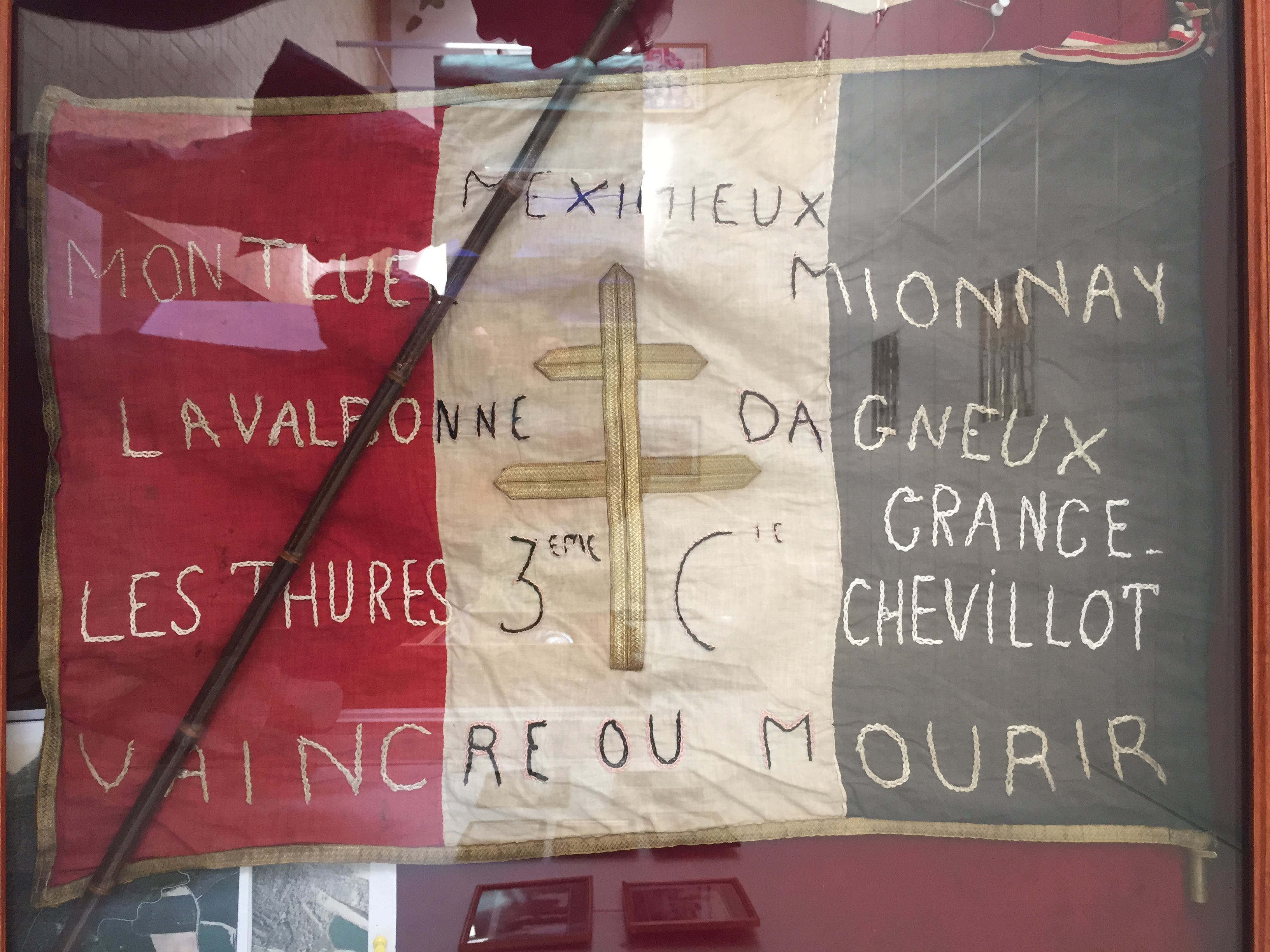 Drapeau du Camp Didier exposé à la mairie de Tramoyes.